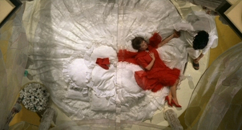 Képkocka a „Júlia és a szellemek” című filmből